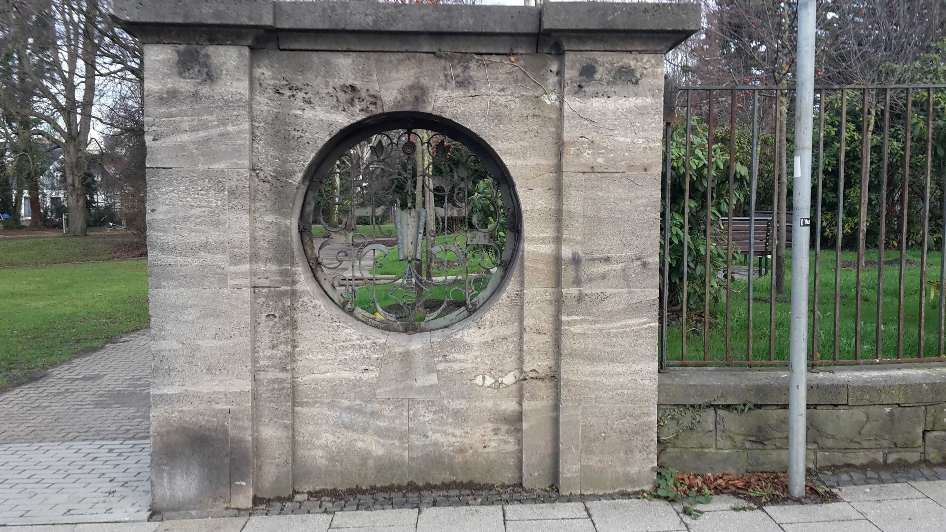 Letzter Überrest der Villa Hill, Hattingen, heute Hillscher Garten nahe der Altstadt